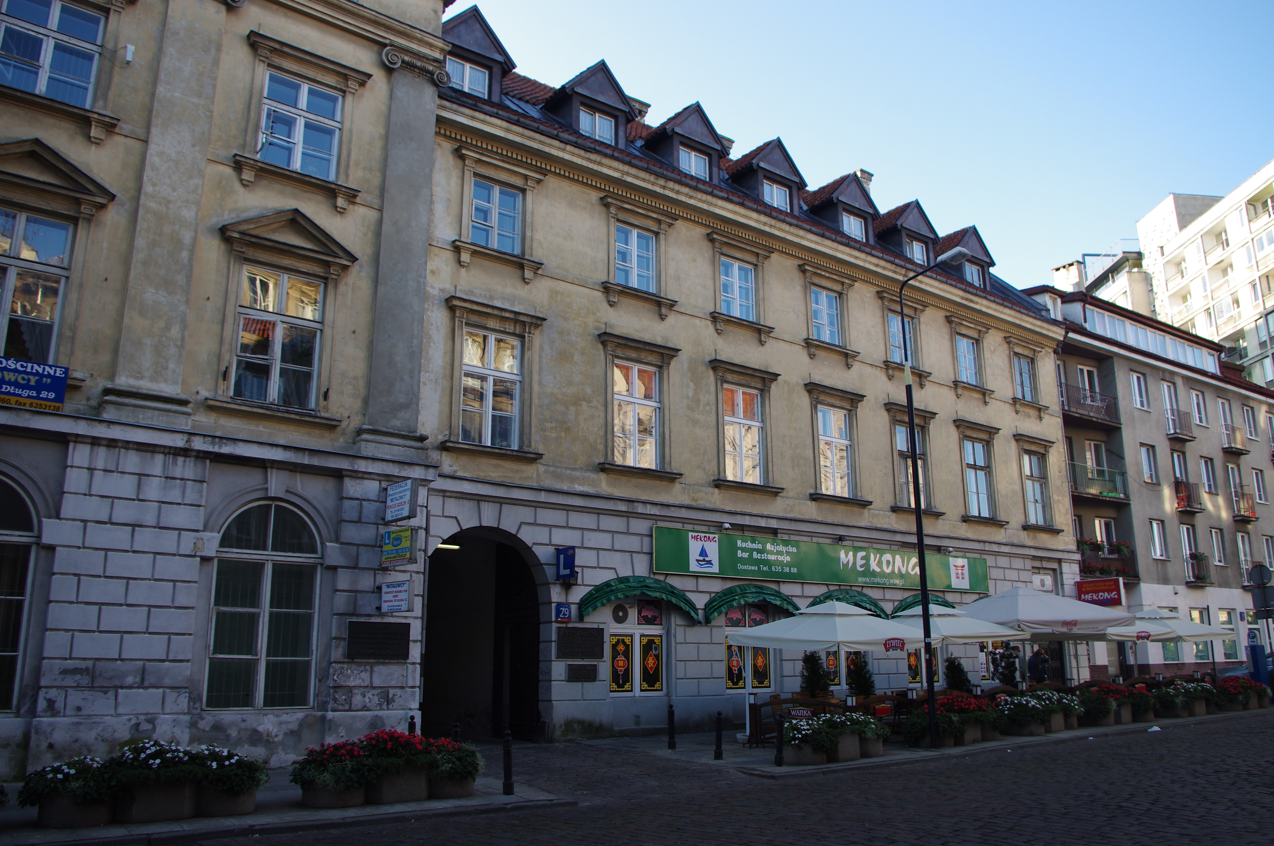 Kamienica przy ul. Długiej 29 w Warszawie, siedziba Federacji Związków Zawodowych "Metalowcy", Związku Zawodowego Przemysłu Elektromaszynowego i Federacji Związków Zawodowych Pracowników Przemysłu Lotniczego, Silnikowego, Mechanicznego, Elektronicznego, Precyzyjnego i Chemicznego "Przemysł Specjalny"